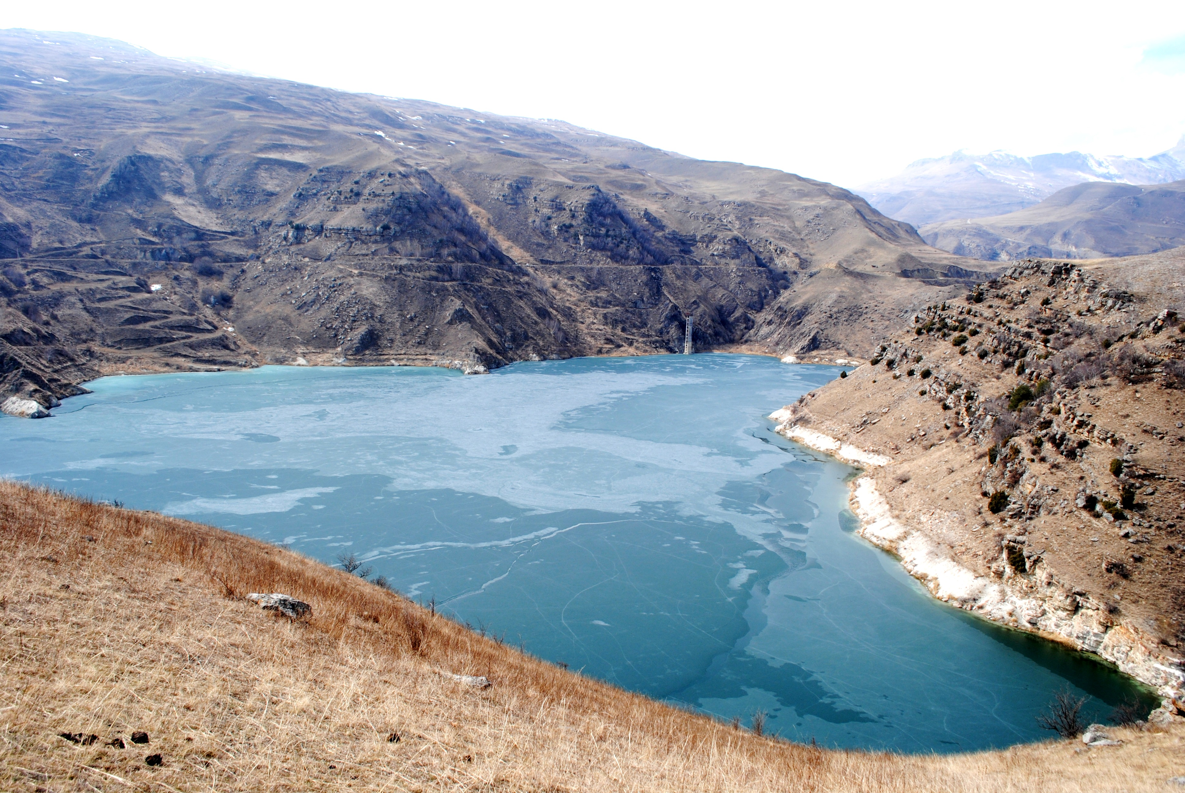 Приэльбрусье: Центральный Кавказ, среднегорная и высокогорная зоны (1400 - 5642 м) в пределах Главного Кавказского и Бокового хребтов. Территория национального парка занимает верховья рр. Малки и Баксана. С северо-запада национальный парк граничит с Карачаево-Черкесской Республикой, с запада - со Ставропольским краем. На юго-западе граница национального парка совпадает с государственной границей между Россией и Грузией. С юга и востока граница проходит по территории Кабардино-Балкарской Республики, соответственно по водоразделу между реками Баксан и Чегем. Расположен Национальный парк в 90 км к западу от г. Нальчика в высокогорной части бассейнов рек Баксана и Малки, в пределах Главного Кавказского (северный склон), Бокового и Передового (южный склон ) хребтов, Зольский район, Кабардино-Балкария This image is related to the protected area of Russia number 0700010